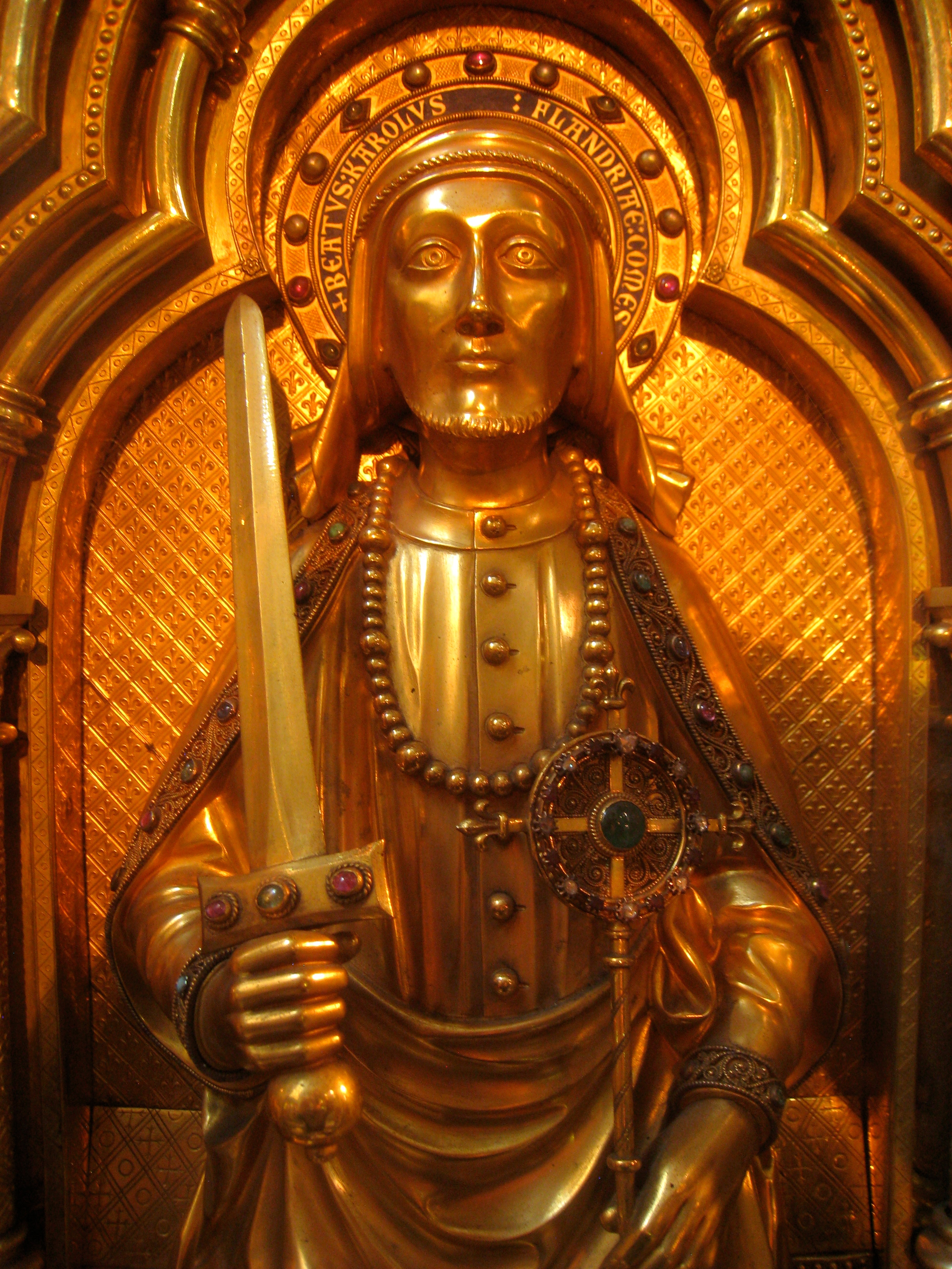 Sint-Salvatorskathedraal in Bruges (Brugge), Belgium.